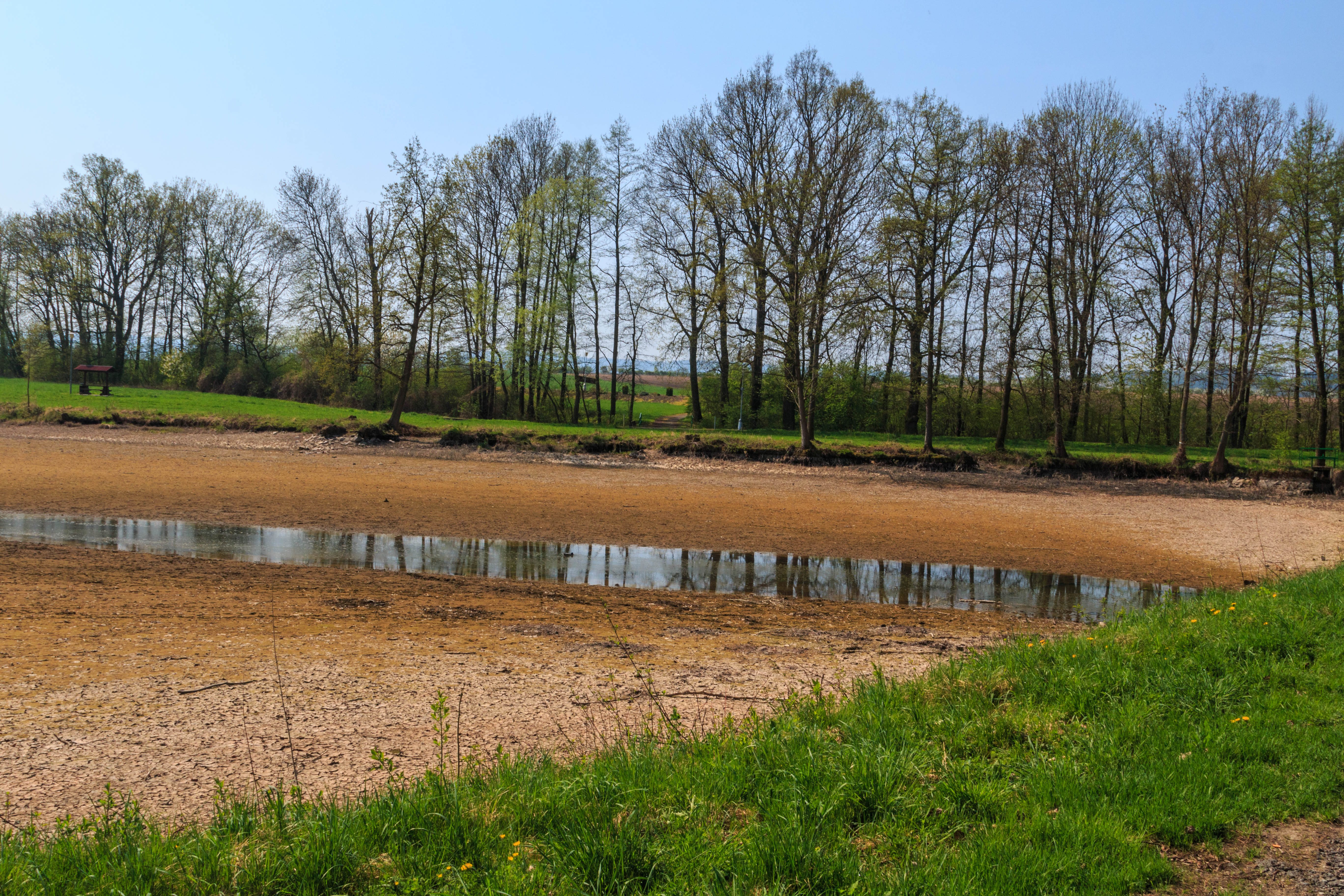 Horní Jeníkovický rybník Project: Vodstvo.